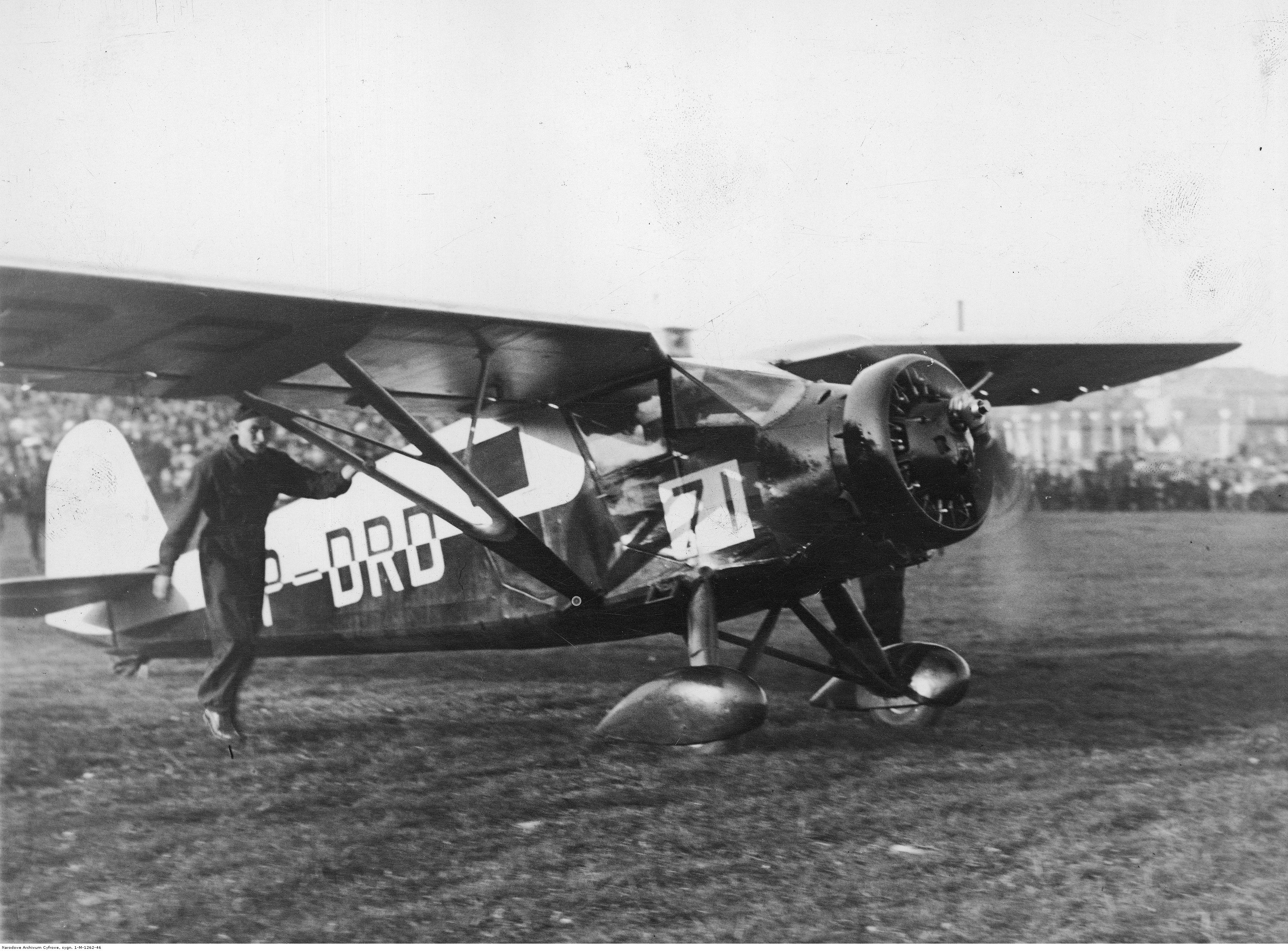 Międzynarodowe Zawody Samolotów Turystycznych (Challenge 1934) w Warszawie. Kapitan pilot Jerzy Bajan po wylądowaniu samolotem RWD-9S na lotnisku. Koncern Ilustrowany Kurier Codzienny - Archiwum Ilustracji. Sygnatura: 1-M-1262-46